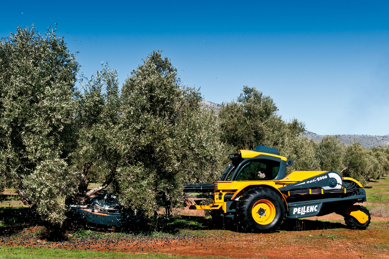 Vibreur automoteur Pellenc Buggy 5000